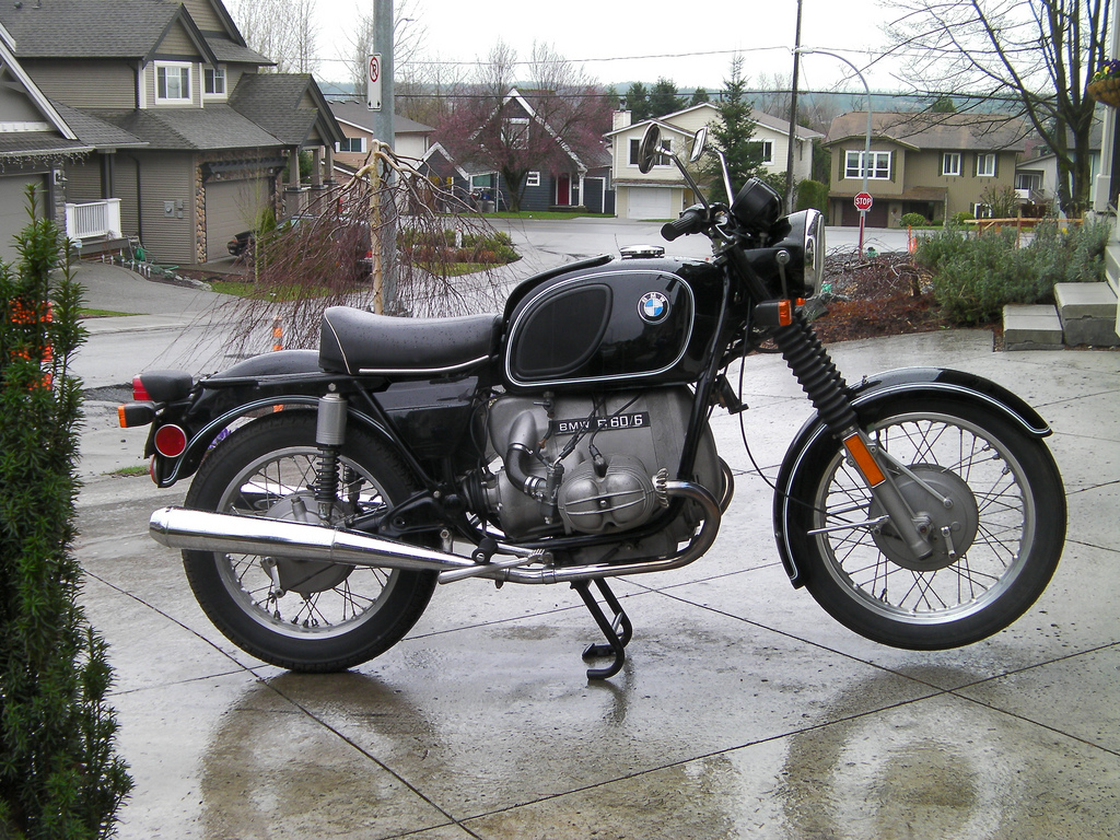 1975 - R60 6, BMW Police Bike